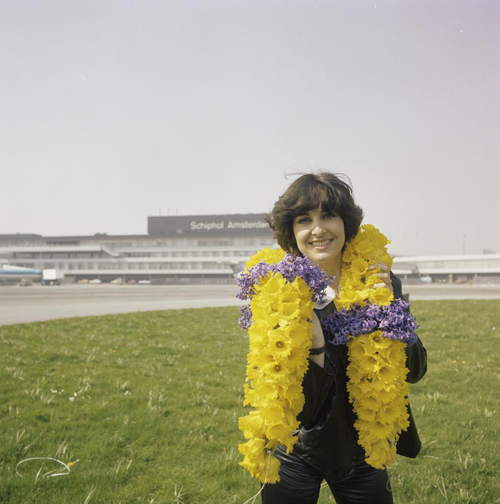 De Zwitserse zangeres Paola del Medico tijdens een fotosessie voor het Eurovisie Songfestival 1980